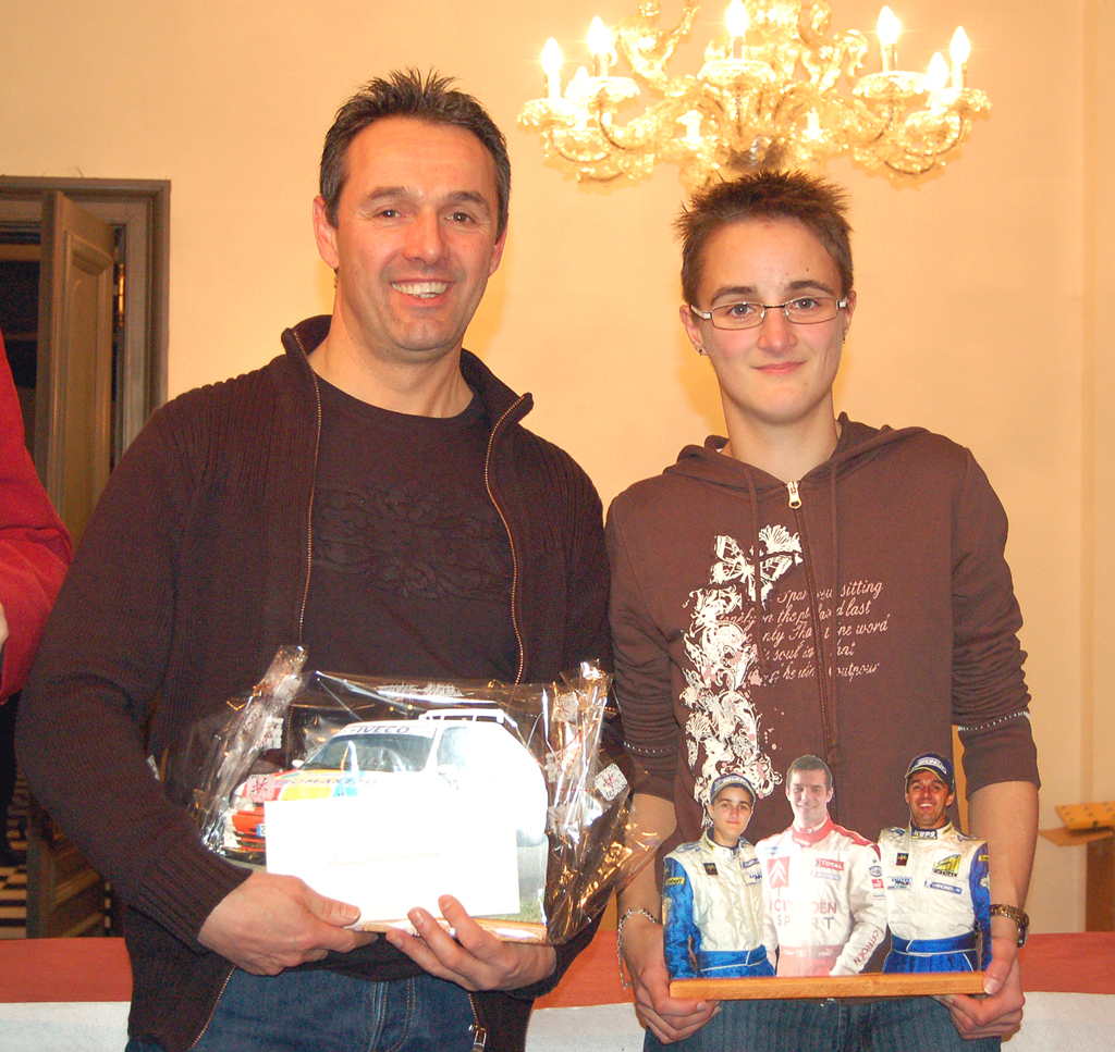 Eric MAUFFREY et Marielle GRANDEMANGE lors de la remise des prix du comité Lorraine-Alsace 2007 au Musée de l'automobile de Mulhouse